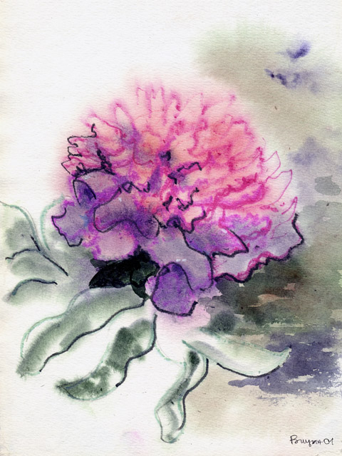 Пион, акварель, 1999